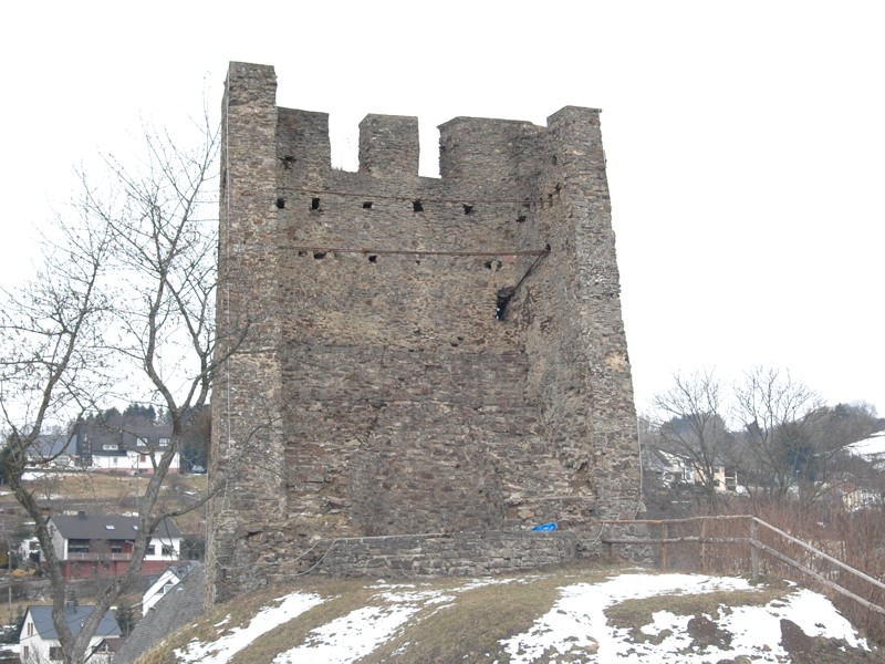 Dasburg, Deutschland